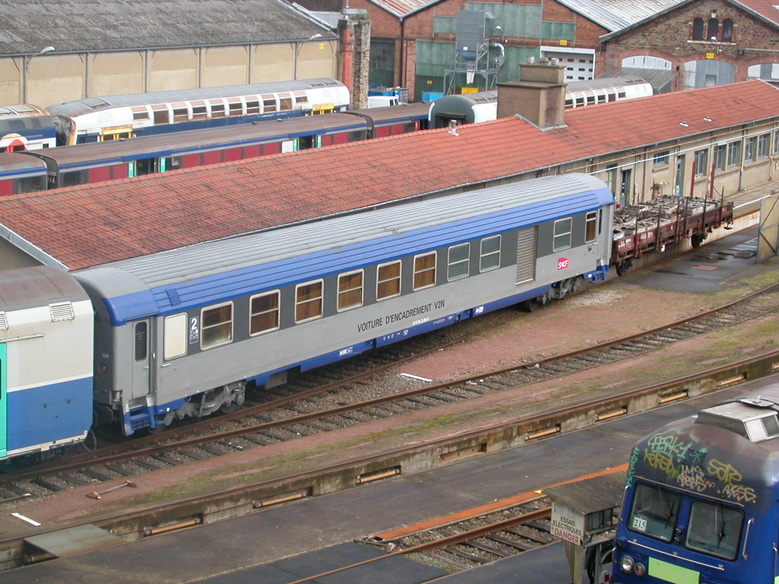 Voiture d'encadrement prise en gare de Rennes